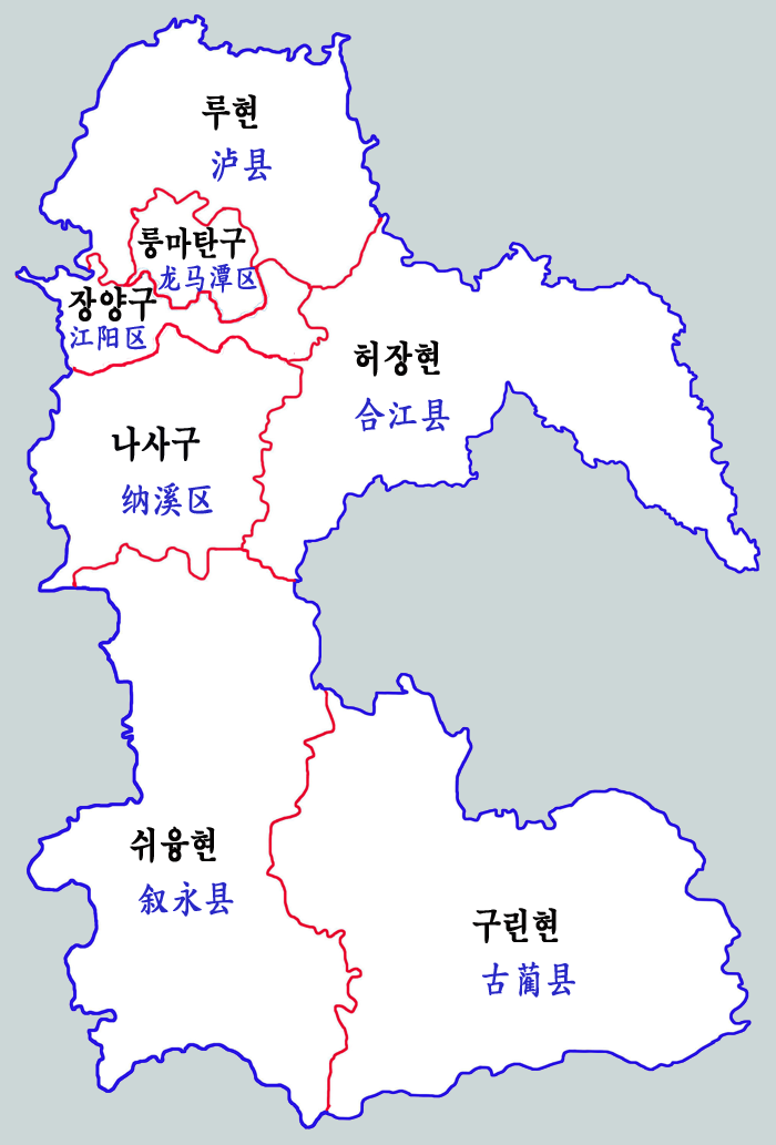 루저우시 현급행정구역